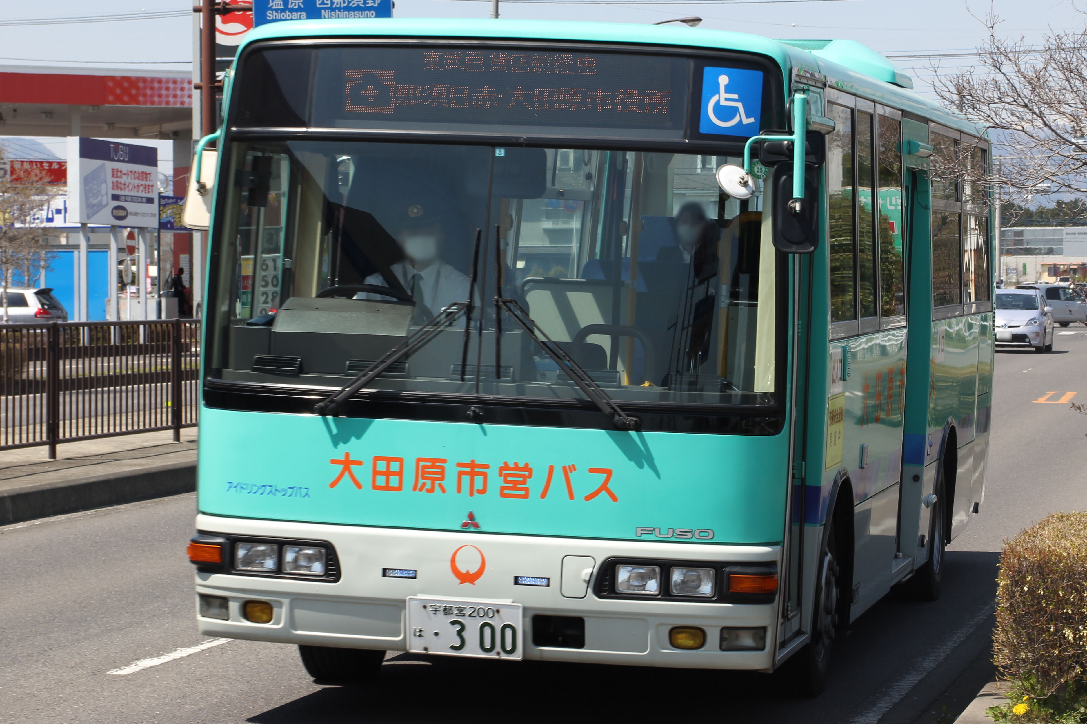 大田原市営バス。大田原市内循環線として運行中のバス。